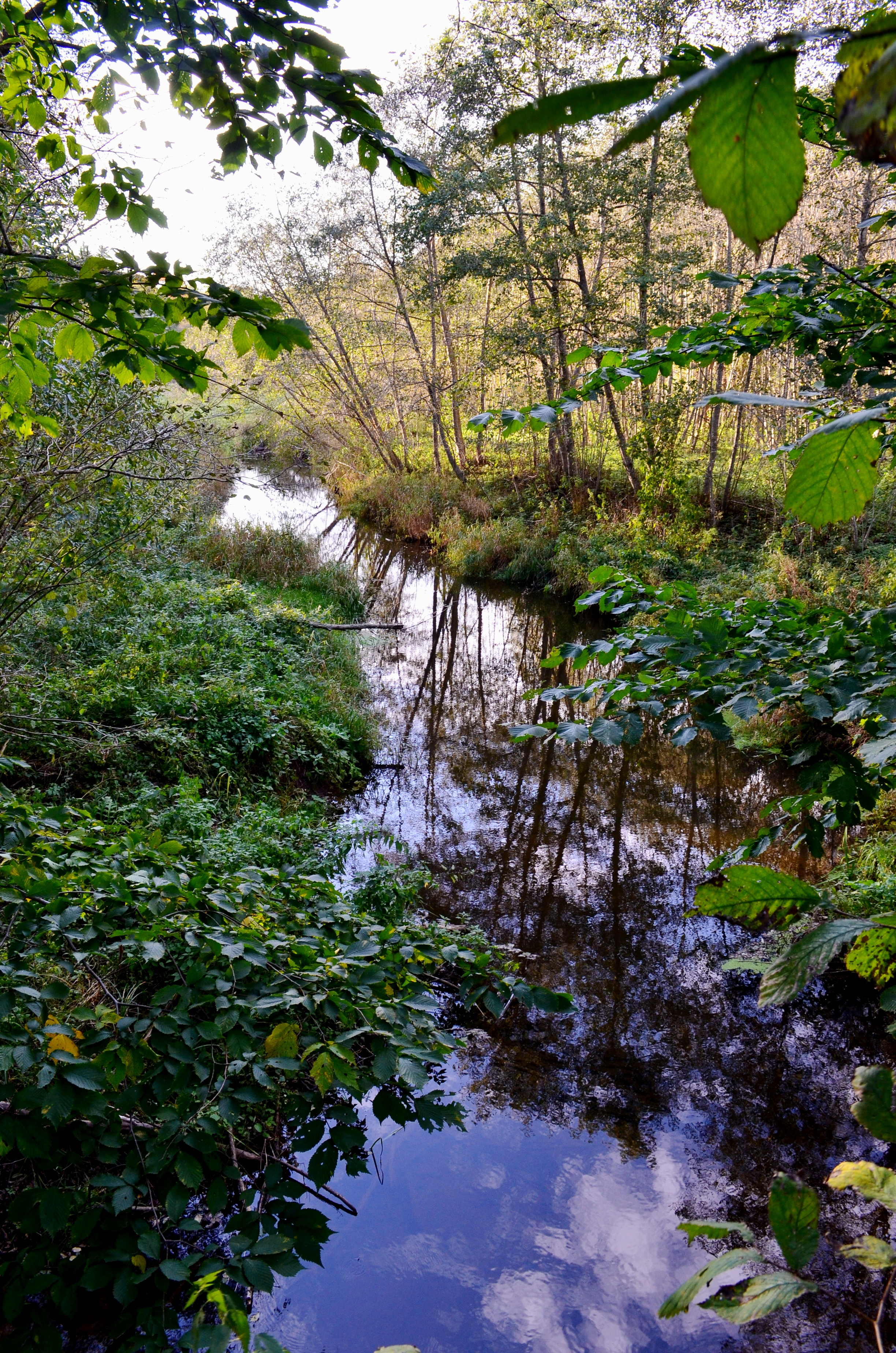 Yžnė prie Gedminiškės, Šilalės raj.